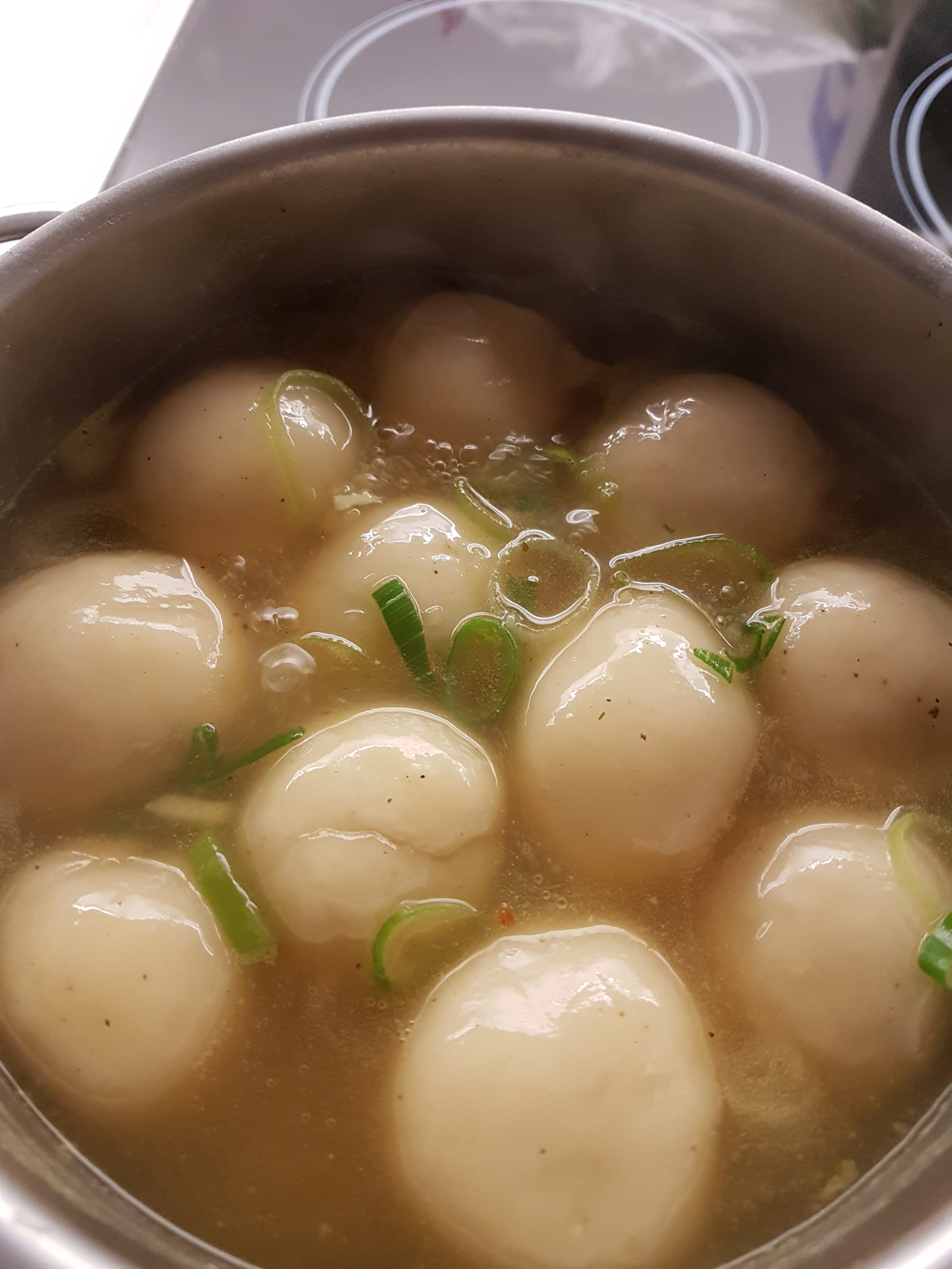 Cilok